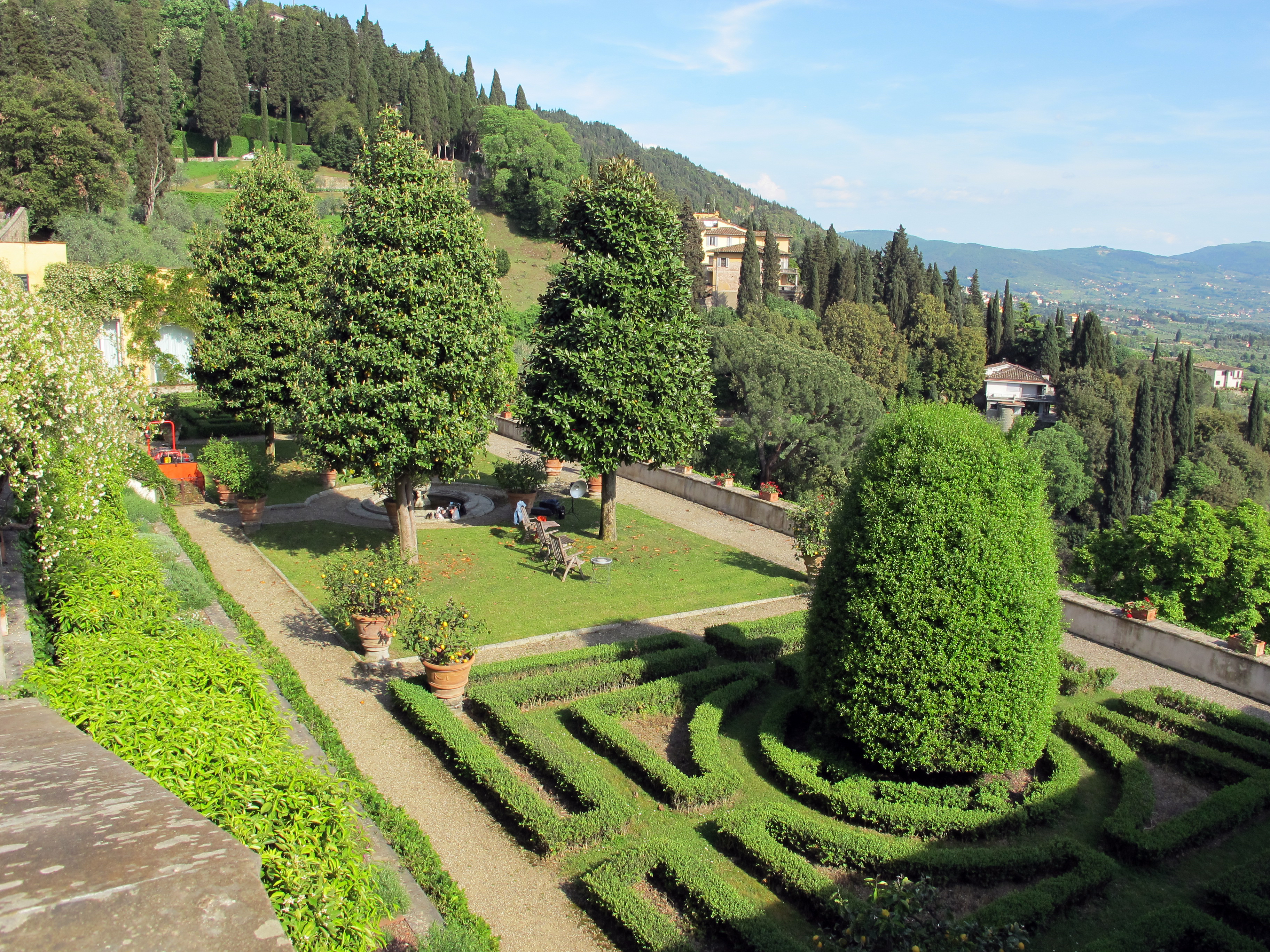 Villa medici di belcanto, terrazza inferiore